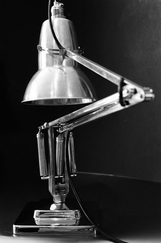 Anglepoise desklamp, Arbeitsleuchte, England, George Carwardine, Federzug